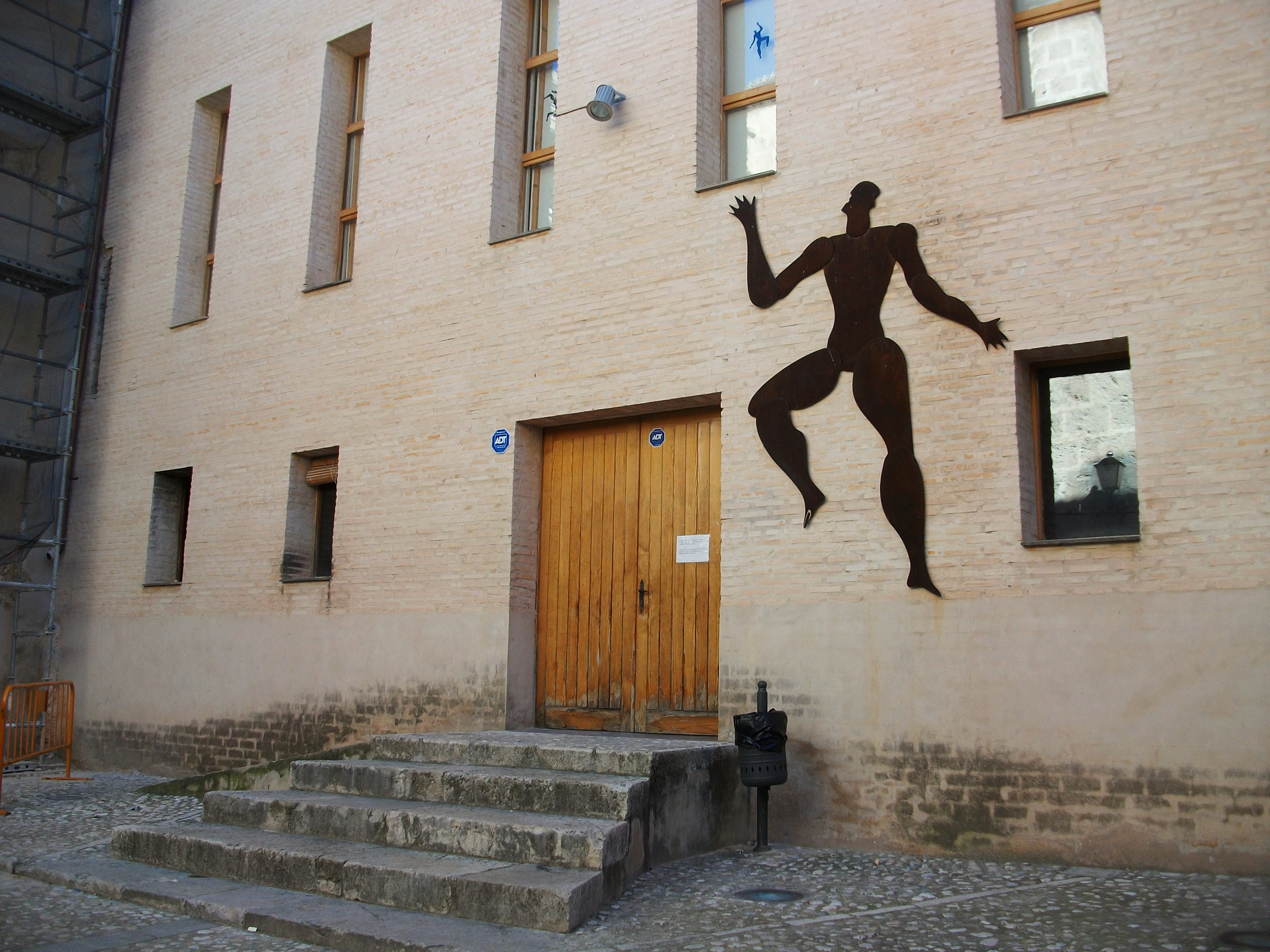 Museu Internacional de Titelles d'Albaida, exterior.